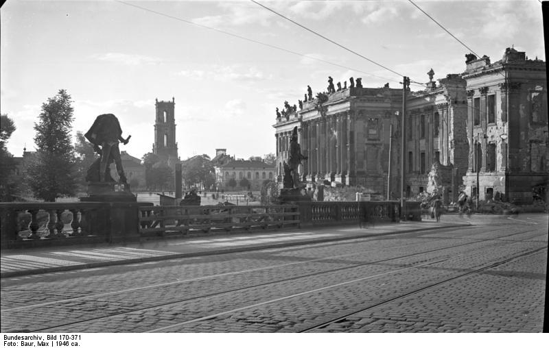 Potsdam.- Blick von der Langen Brücke